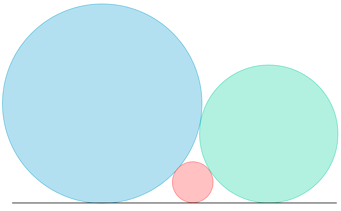 problema sangaku de la prefectura de Gumma. trata sobre 3 círculos que son tangentes entre si y a una misma recta, el problema consiste en encontrar la relación que existe entre los radios de los tres círculos Software: Hecho en Geogebra 2.7.10